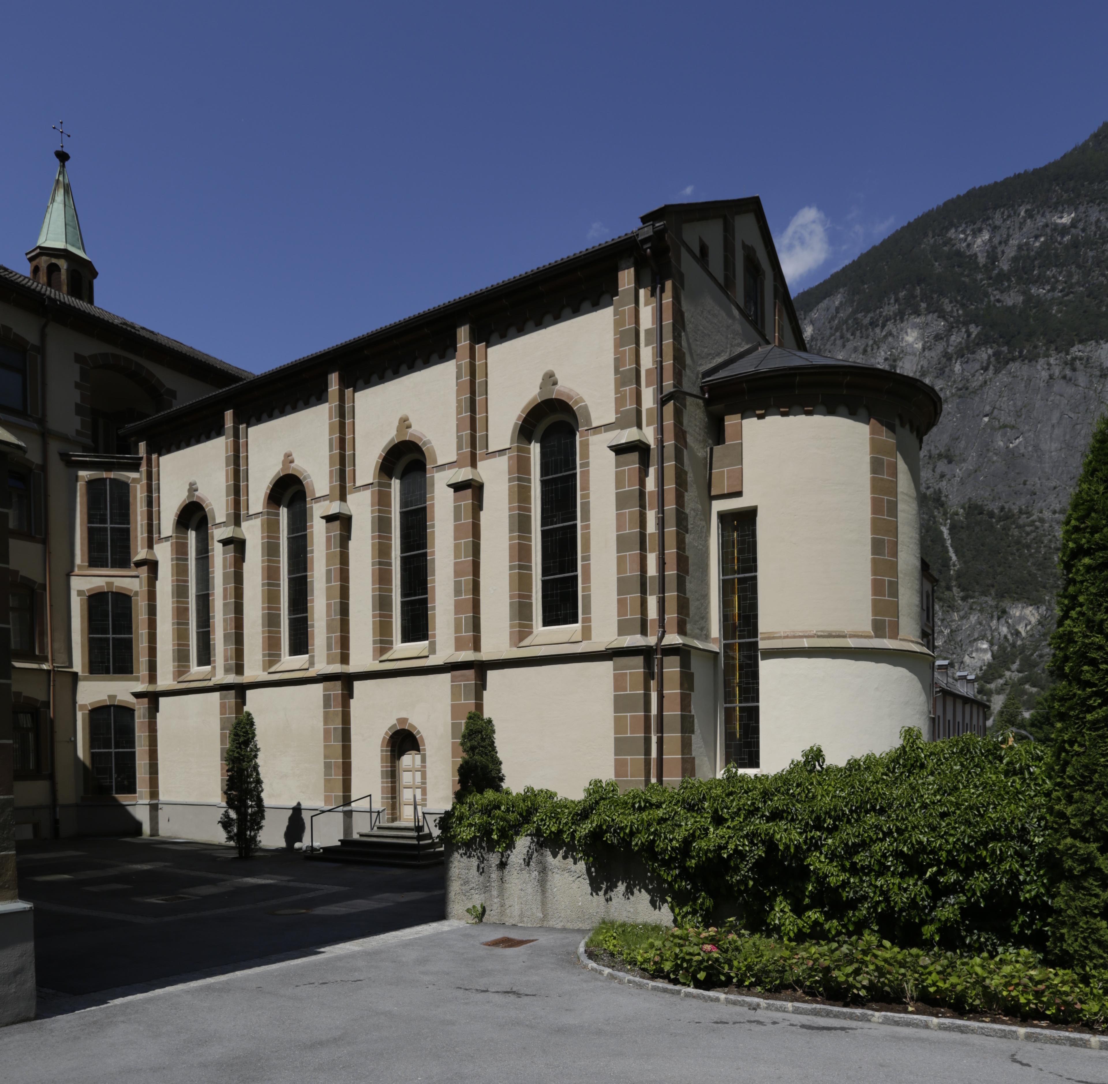 Die Klosterkirche des Mutterhauses der Barmherzigen Schwestern in Zams, ist zusammen mit dem Klosterfriedhof denkmalgeschützt.